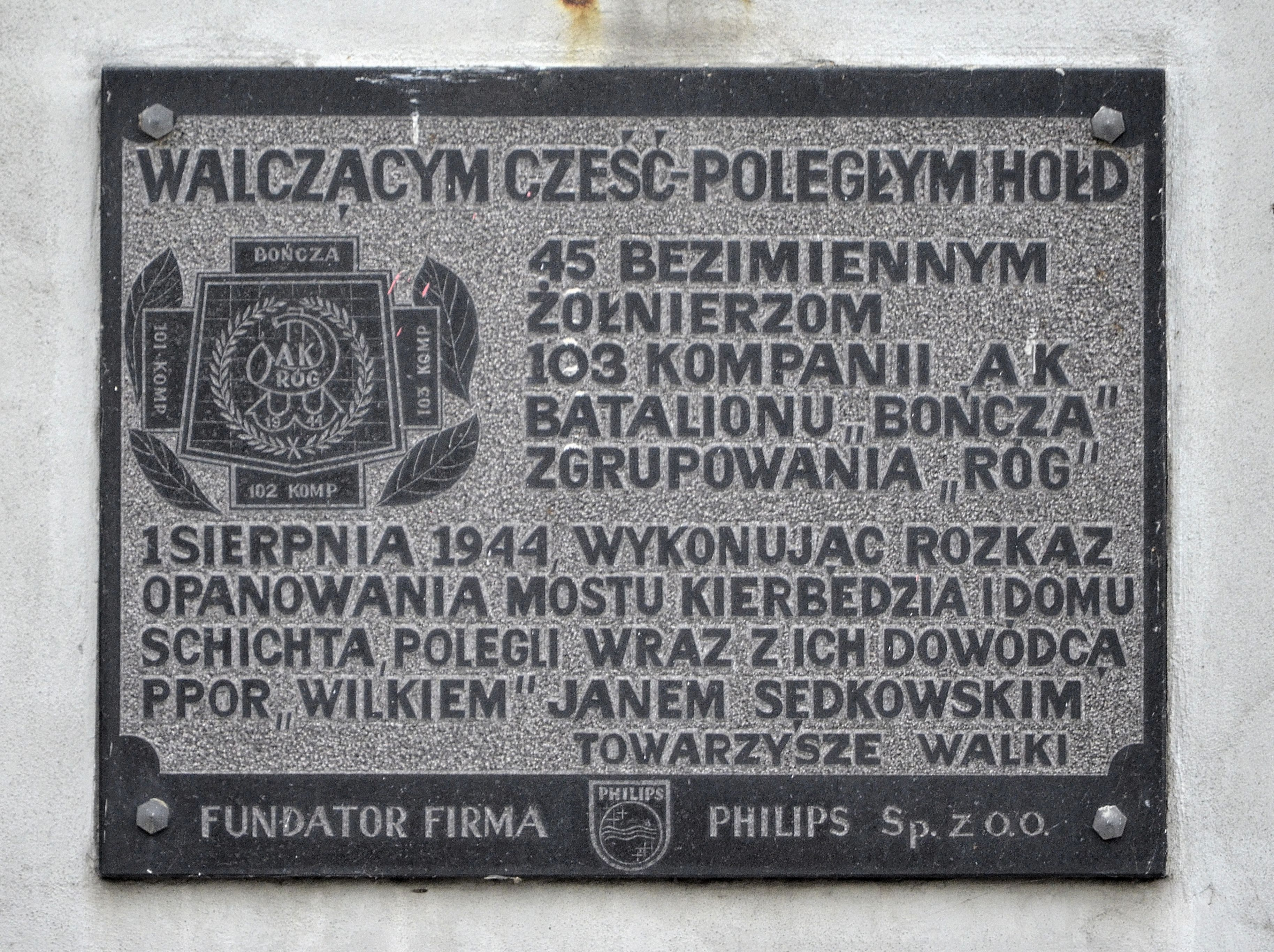 Tablica upamiętniająca żołnierzy batalionu "Bończa" na moście Śląsko-Dąbrowskim